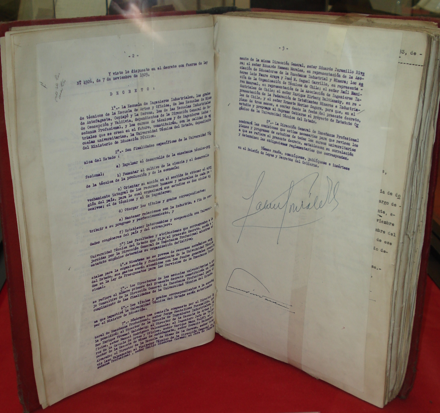 Decreto que crea la Universidad Técnica del Estado, actual Universidad de Santiago de Chile. Archivo Nacional de Chile.